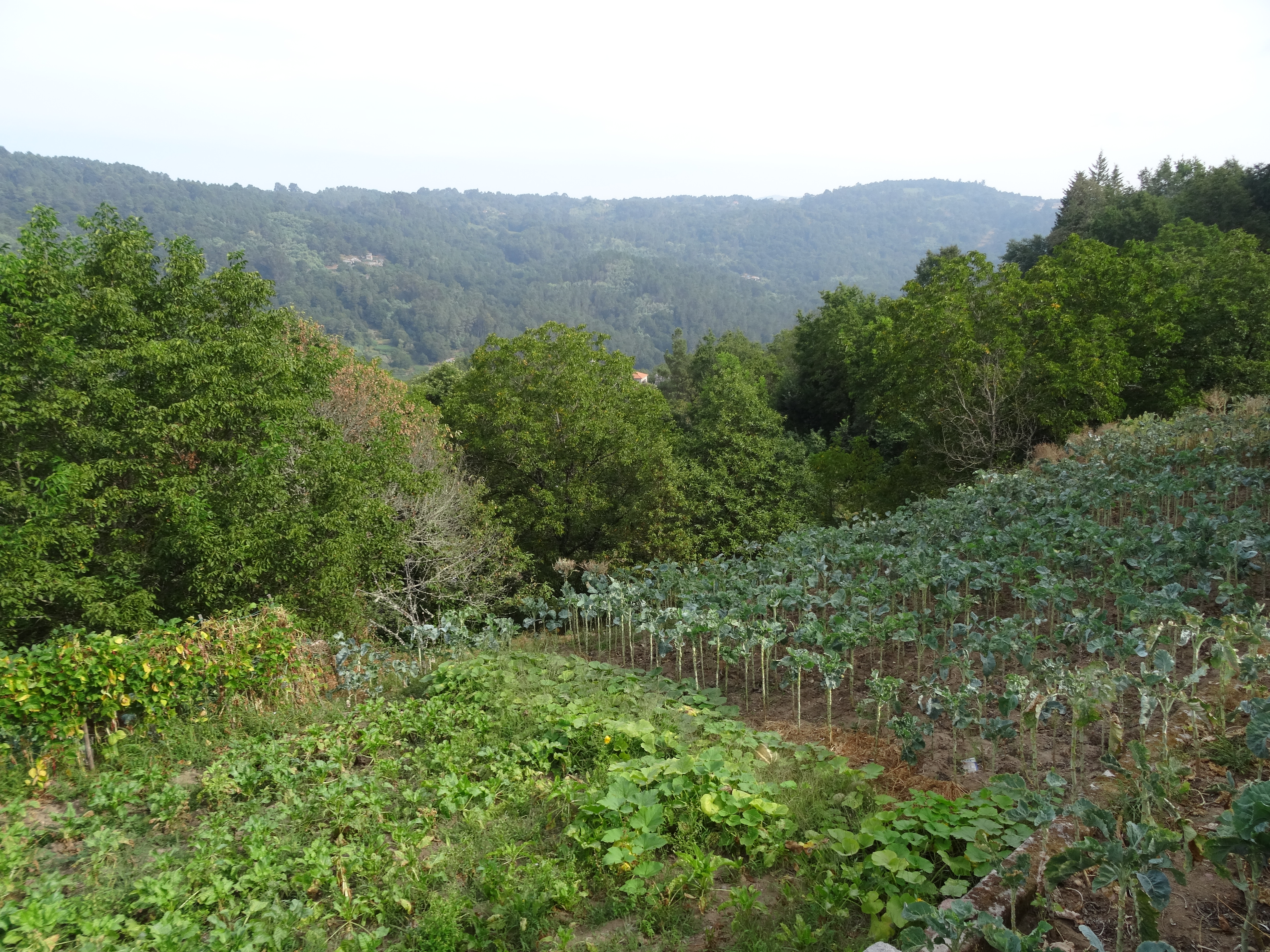 Ver título.